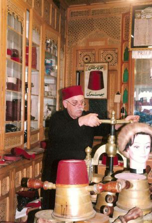 Atelier Belhassen Troudi de manufacture du chechia megidi et du chechia stambouli